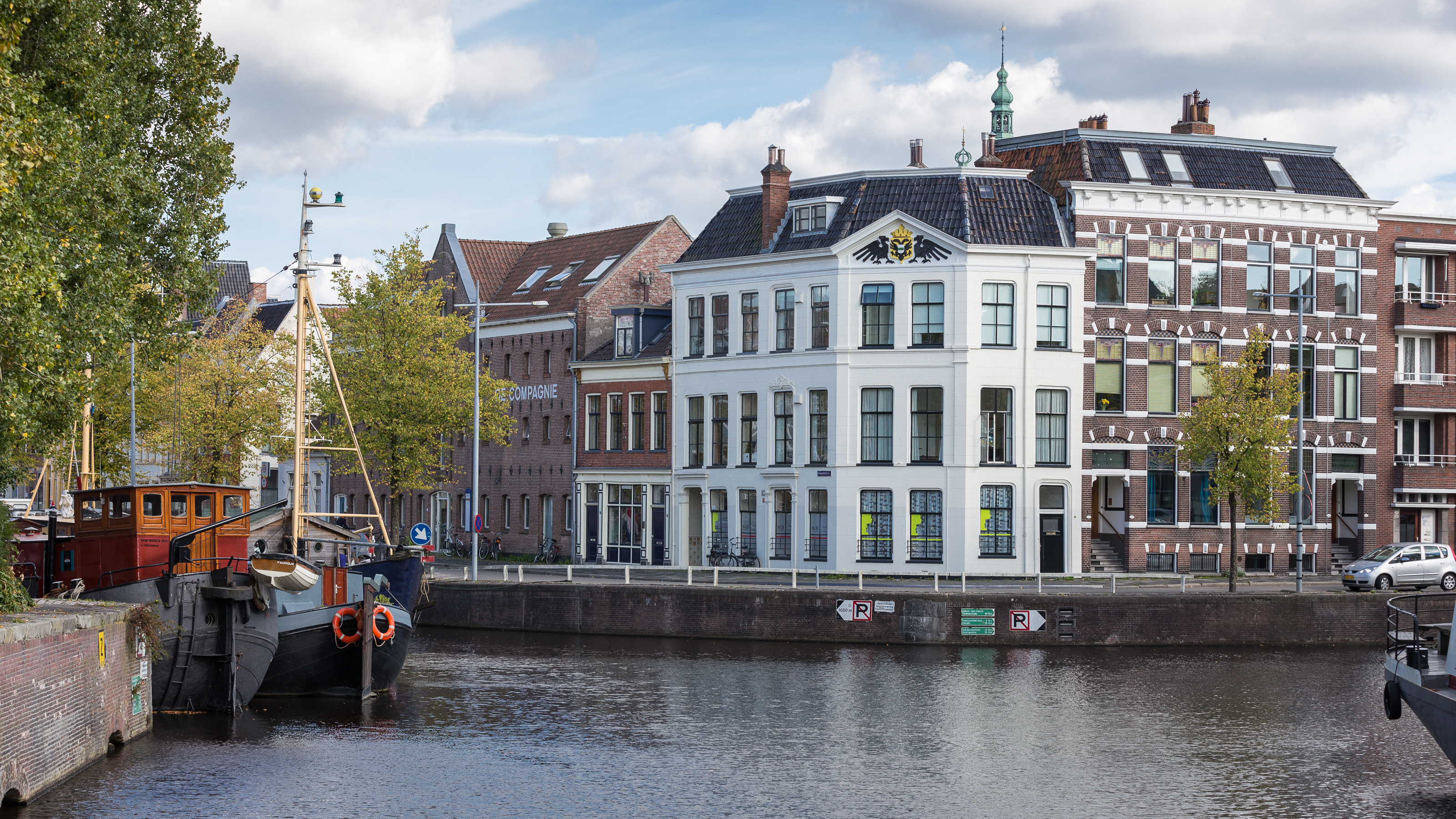 Groningen, Noorderhave